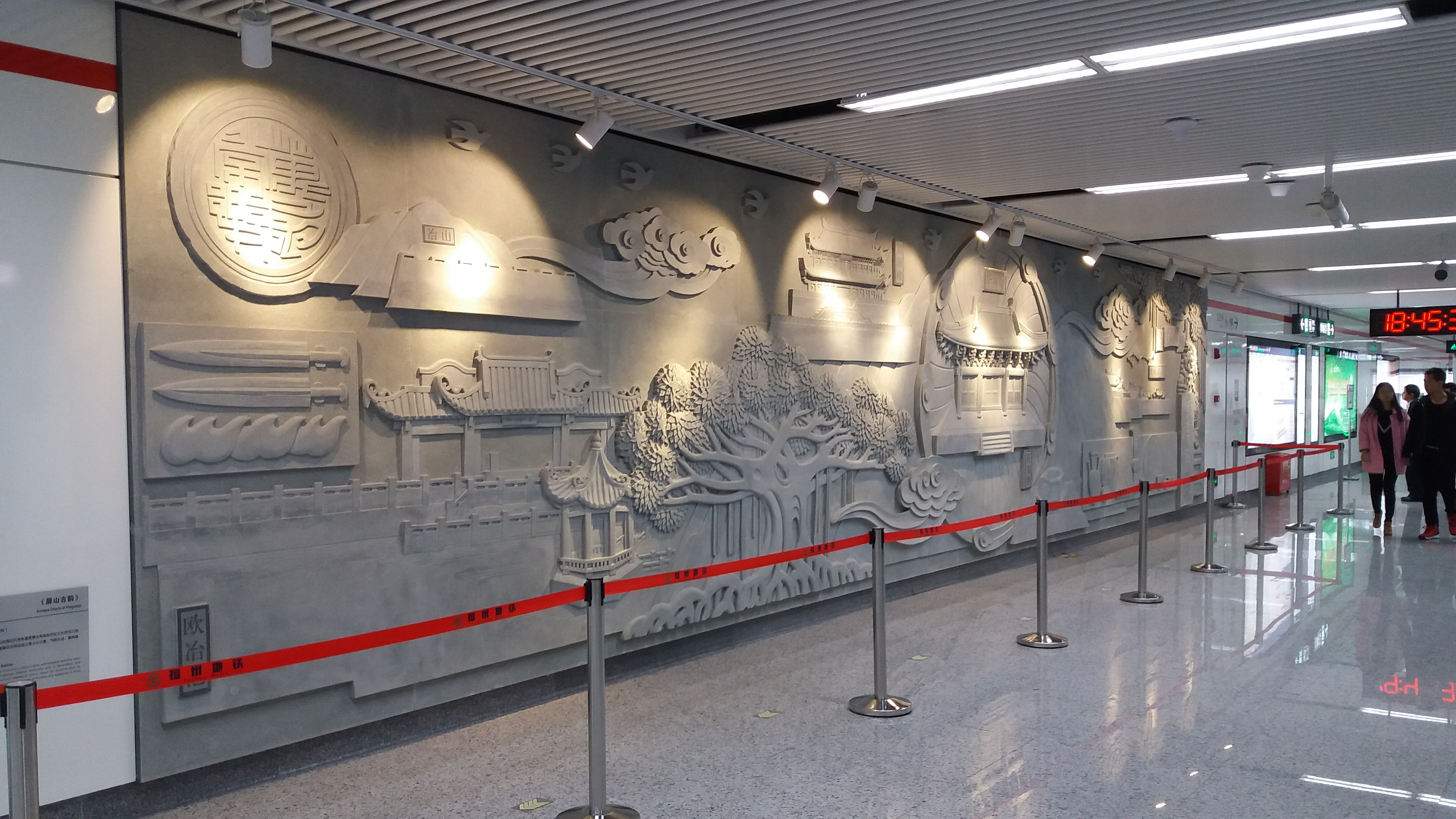 福州地铁屏山站浮雕《屏山古韵》，由雕塑家程俊华担任艺术总监，雕塑家张文霞领衔主创。